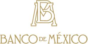 Banco de México